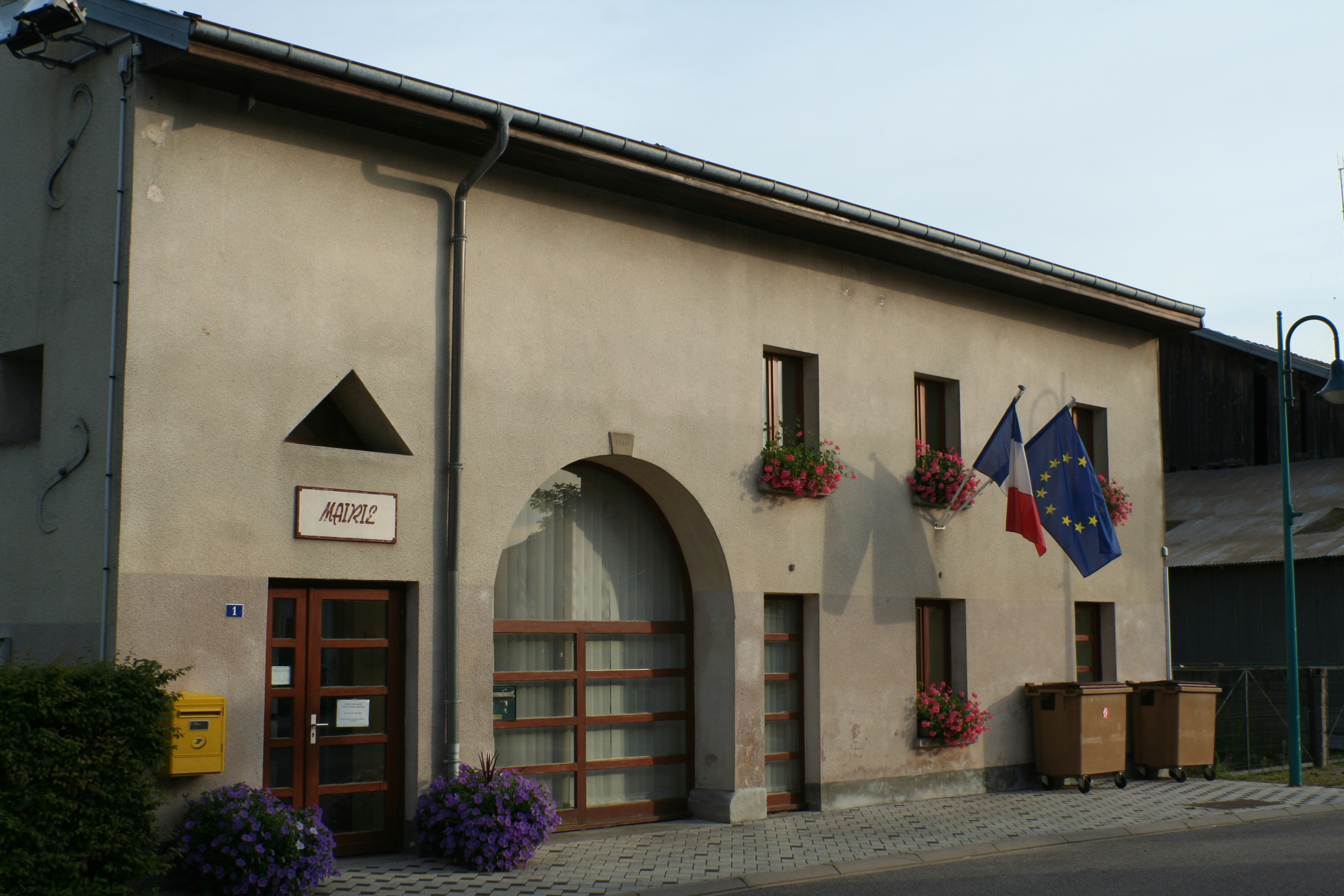 Mairie de Moyemont (Vosges)